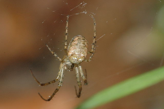 female Metellina segmentata from Commanster, Belgian High Ardennes .